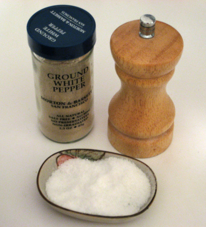 Häufig verwendete Grundgewürze: Pfeffer (hier gemahlener weißer Pfeffer, daneben eine mit schwarzen Pfefferkörnern gefüllte Pfeffermühle) und Salz (Speisesalz, in einem Schälchen).